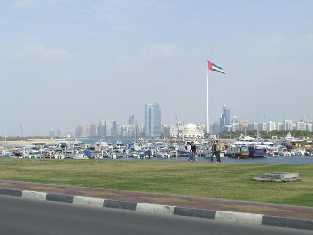 Abu Dhabi